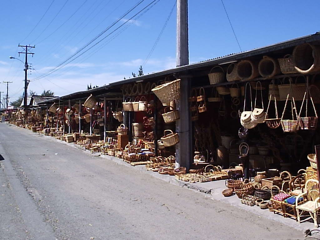 Artesanos de mimbre de Chimbarongo Autor:Alstradiaan Fecha:Febrero de 2005 Fotografía tomada con una cámara digital Olympus camedia D-395 de 3.2 megapixeles